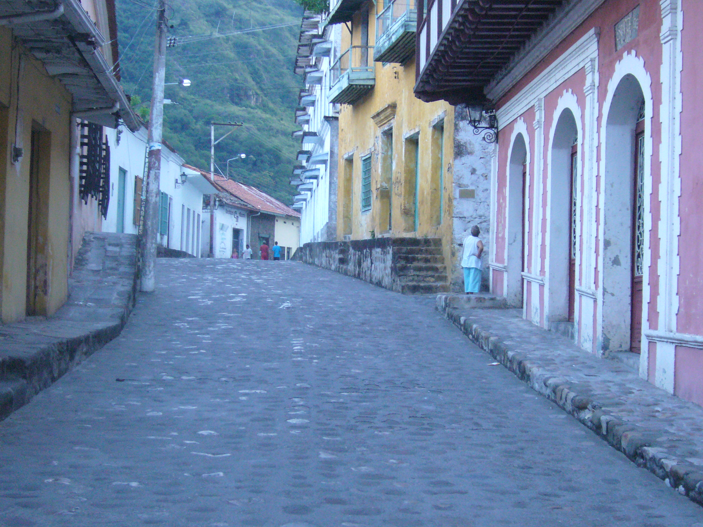 Zona colonial Honda - Tolima (Colombia)